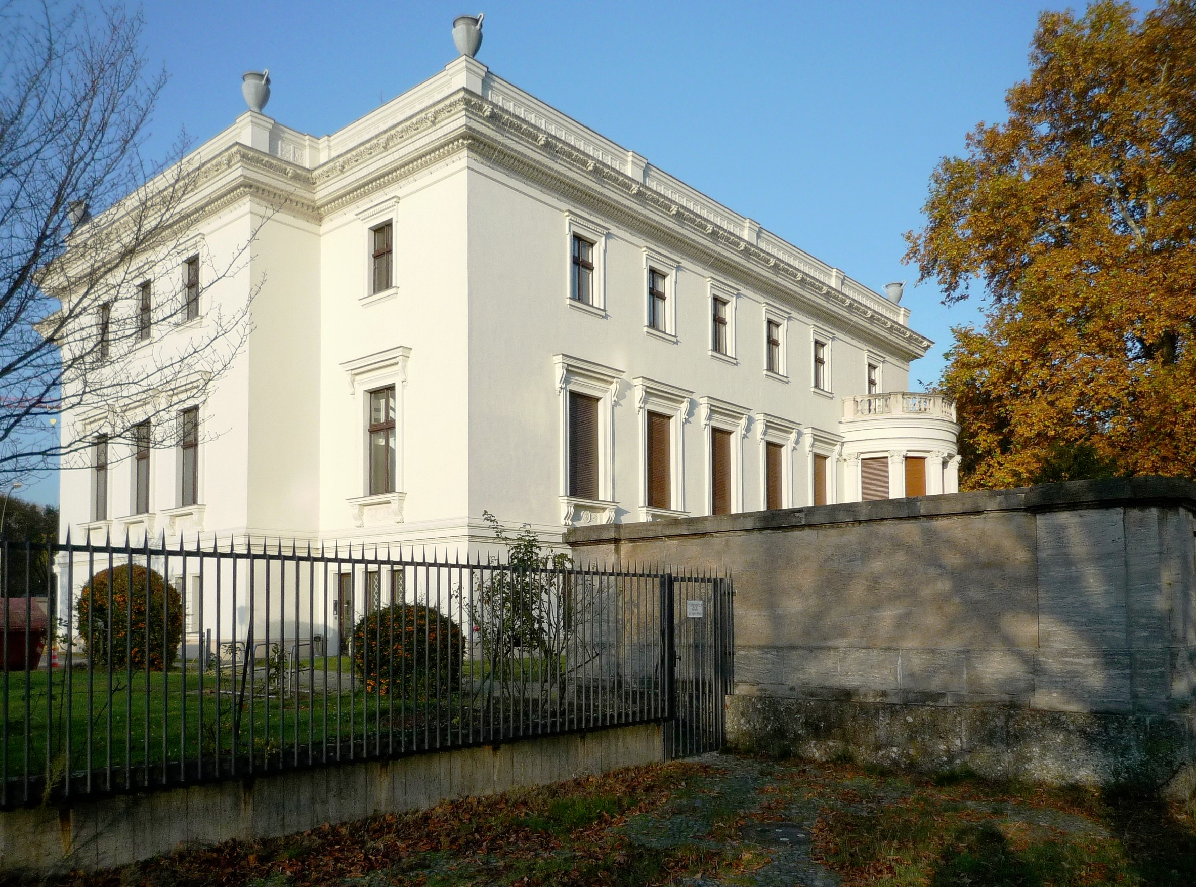 Die Villa von der Heydt am Landwehrkanal in Berlin, Sitz des Präsidenten und der Hauptverwaltung der Stiftung Preußischer Kulturbesitz (SPK). Blick von Südwesten.